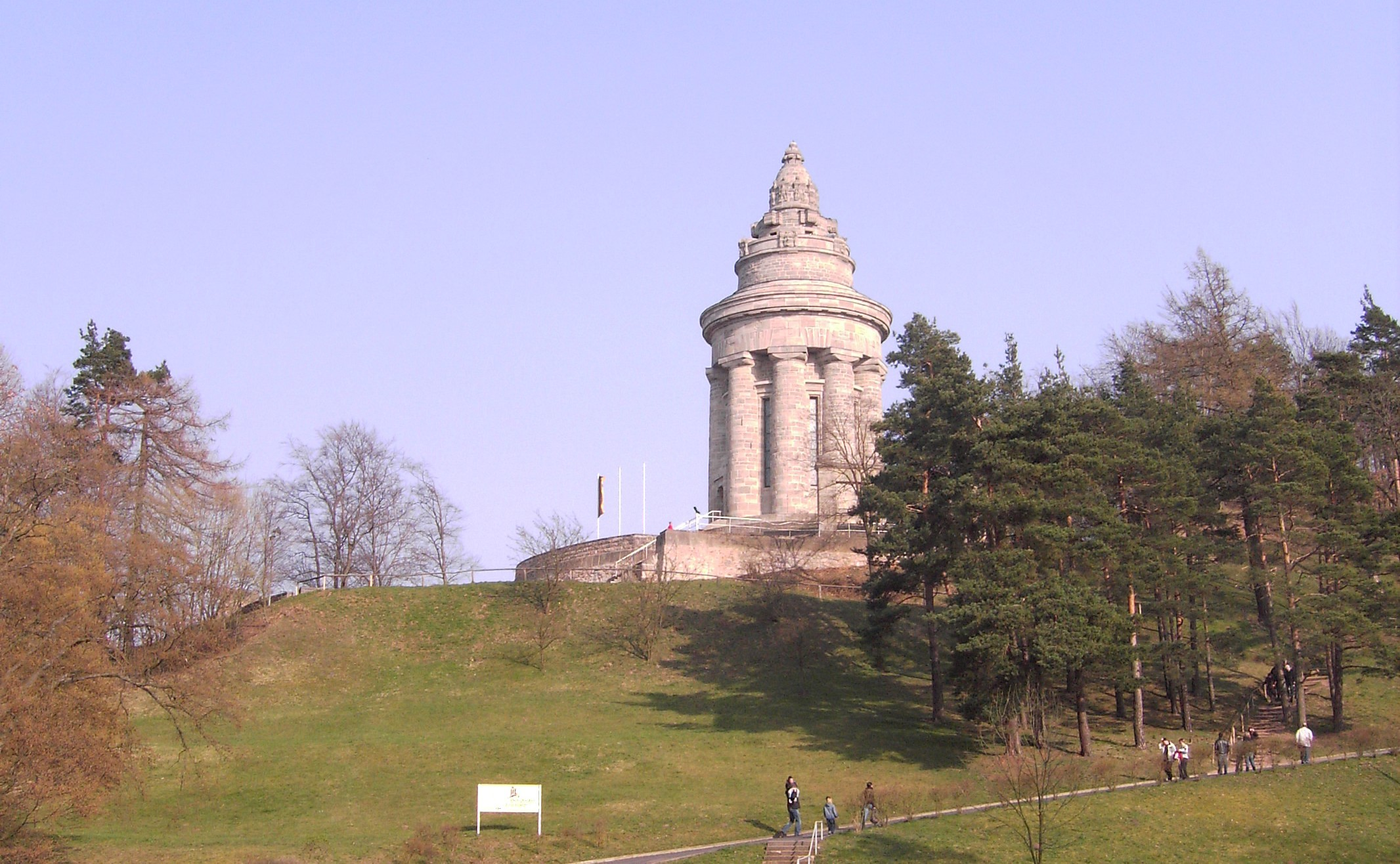 Burschenschaftsdenkmal, Eisenach. Architekt: Wilhelm Kreis